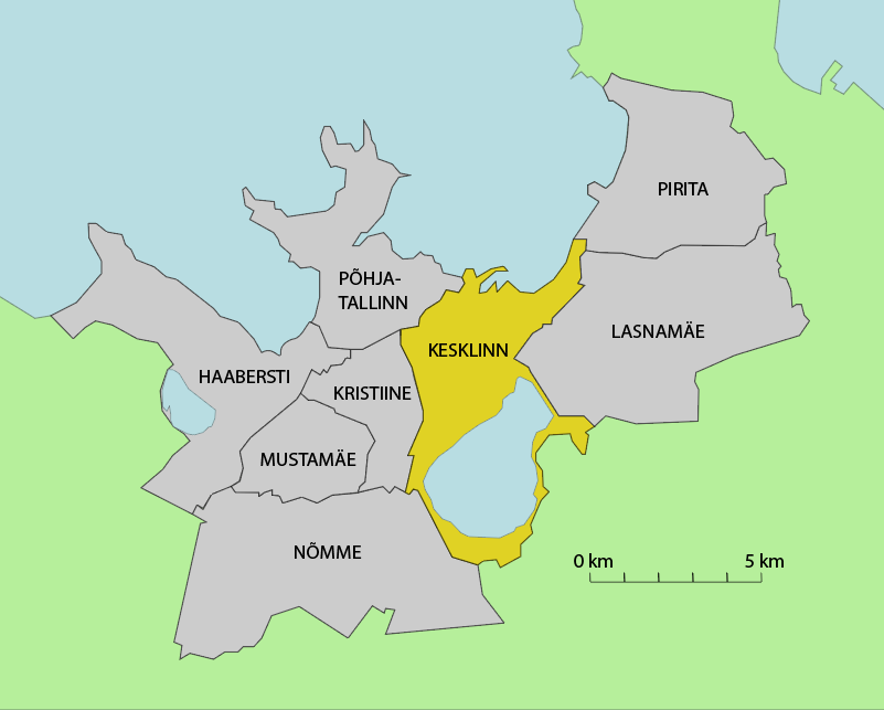 Kaart kesklinna linnaosa paiknemisest Tallinnas.